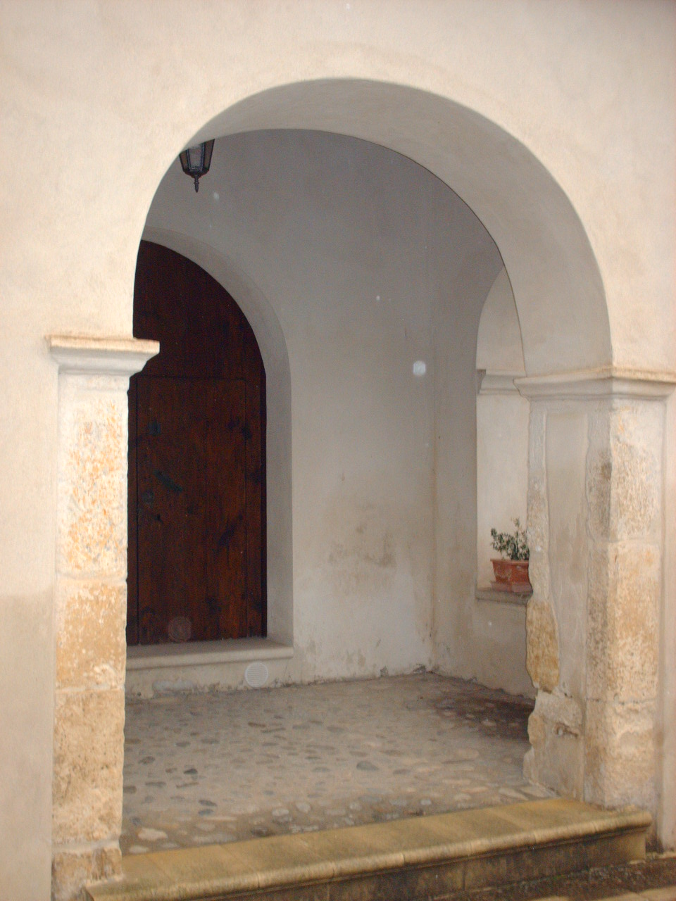 Chiesa Madonna delle Grazie 3